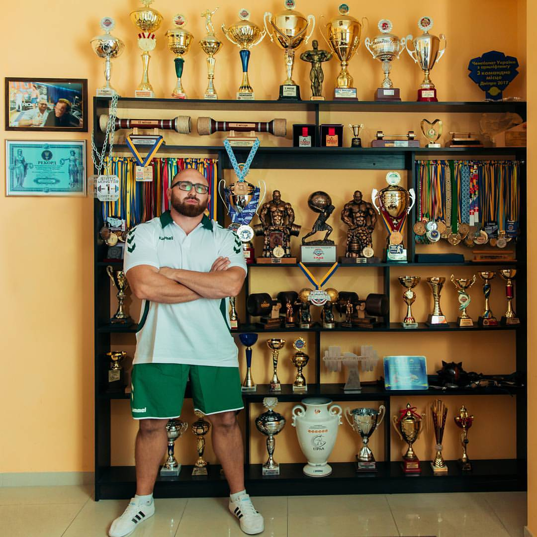 Награды, кубки, медали